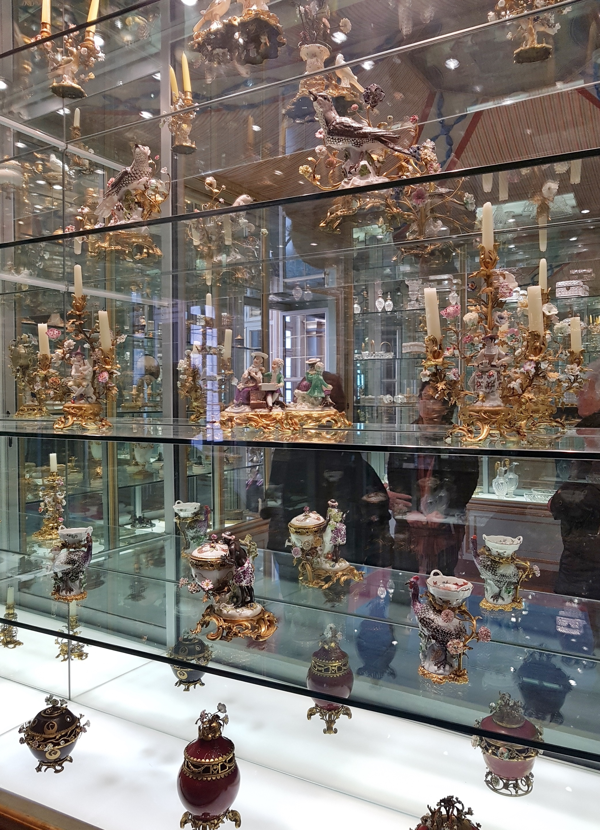 Sala degli oggetti montati, Museo di Arti Decorative Accorsi–Ometto, Torino